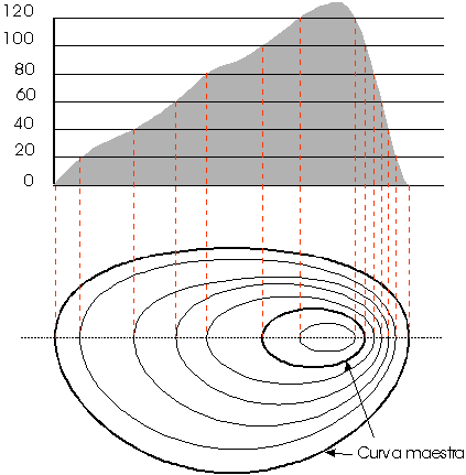 Esquema de cómo se hacen unas curvas de nivel.